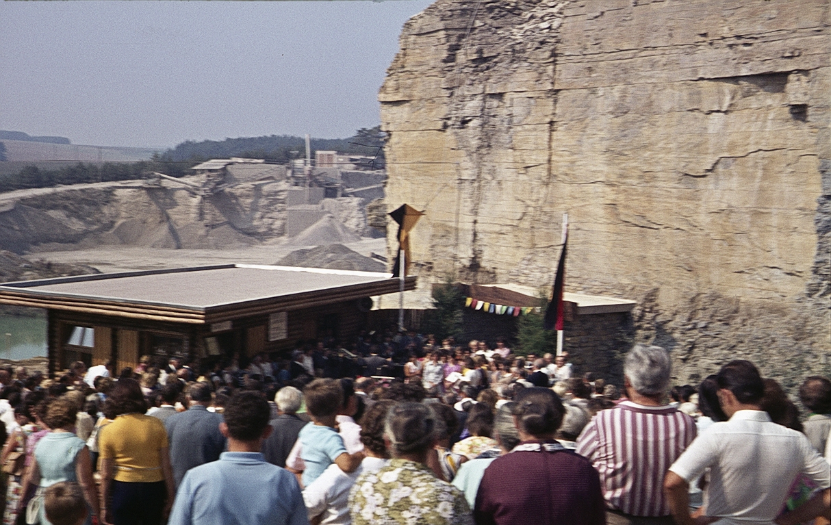 Eberstadter Tropfsteinhöhle: Eröffnungsfeier